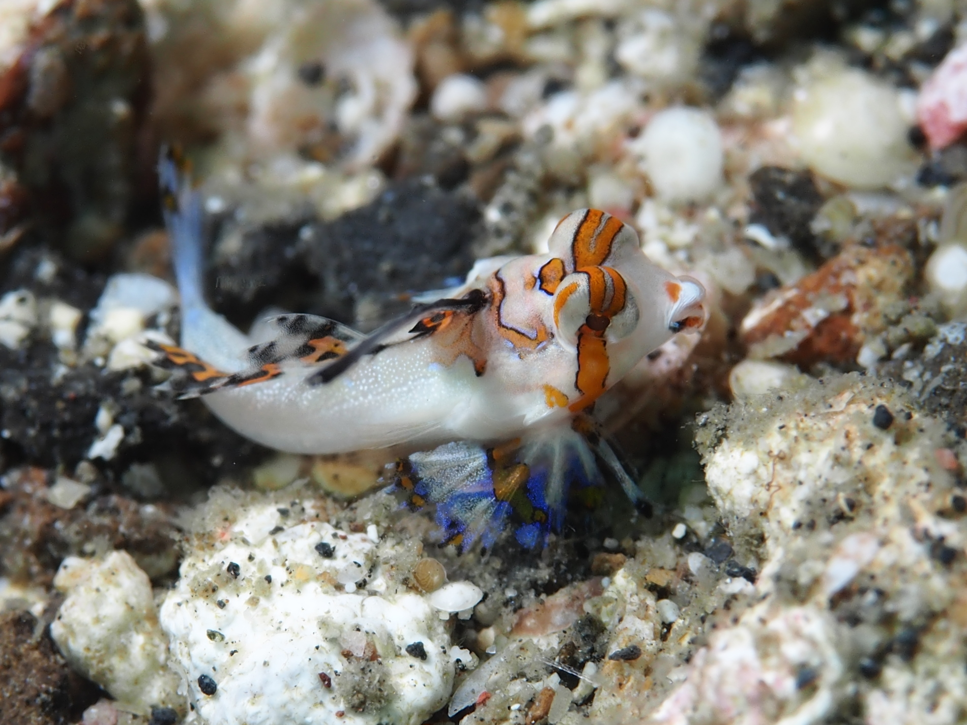 Lembeh, Indonesia - Orange-black dragonet juvenile (Dactylopus kuiteri)